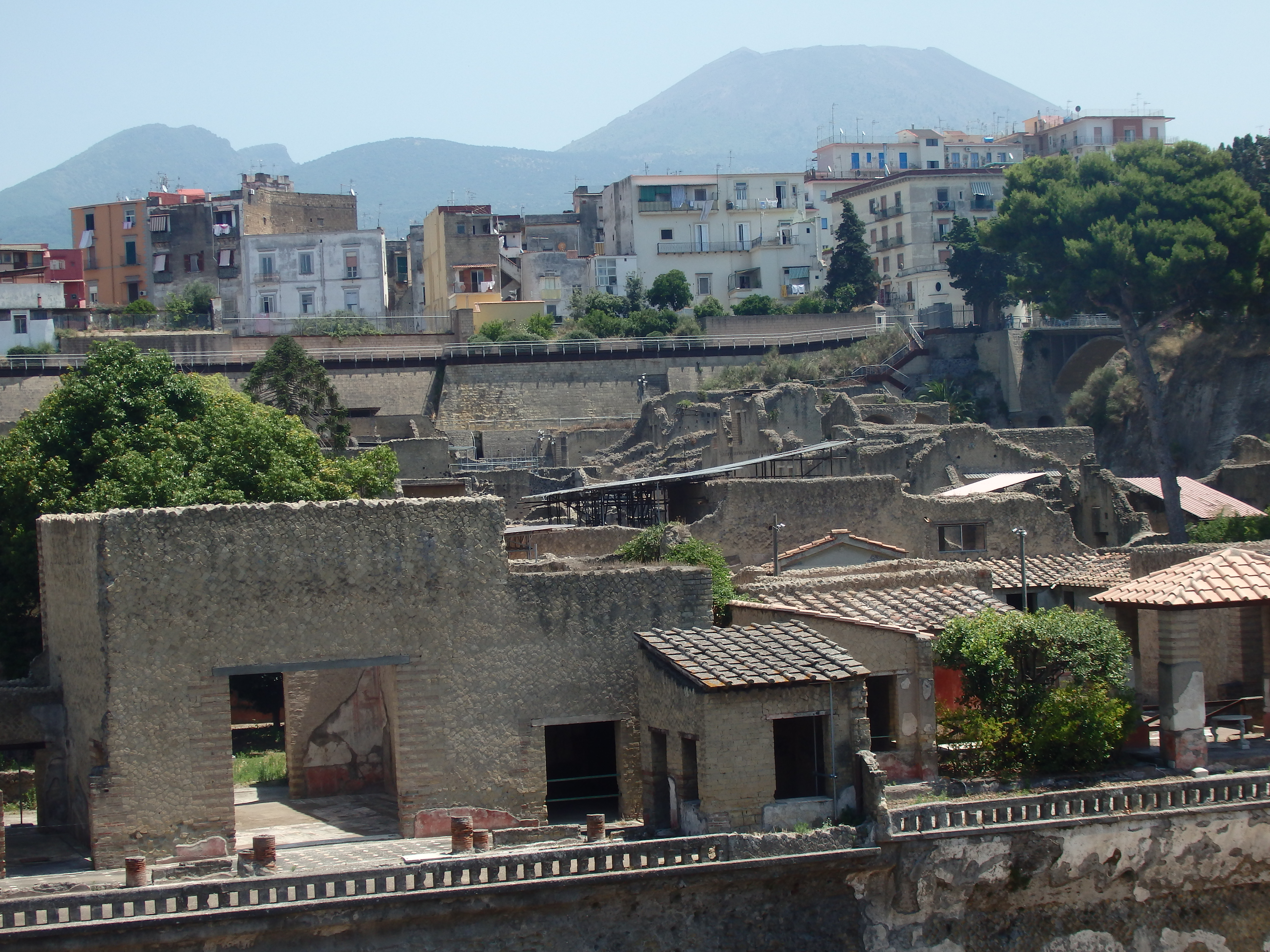 Ercolano nel 2016.